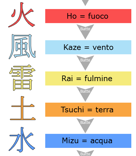 Immagine che illustra i tipi di chakra in naruto, creata con . gli ideogrammi NON sono quelli dell'anime ma quelli di un carattere.